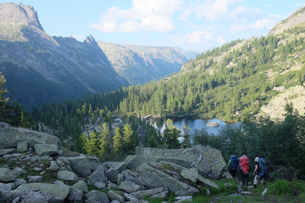 Ергаки, Ермаковский район This image is related to the protected area of Russia number 2410078